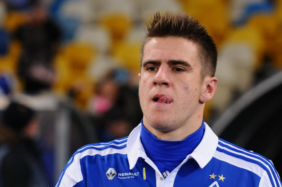 Артем Бесєдін - український футболіст